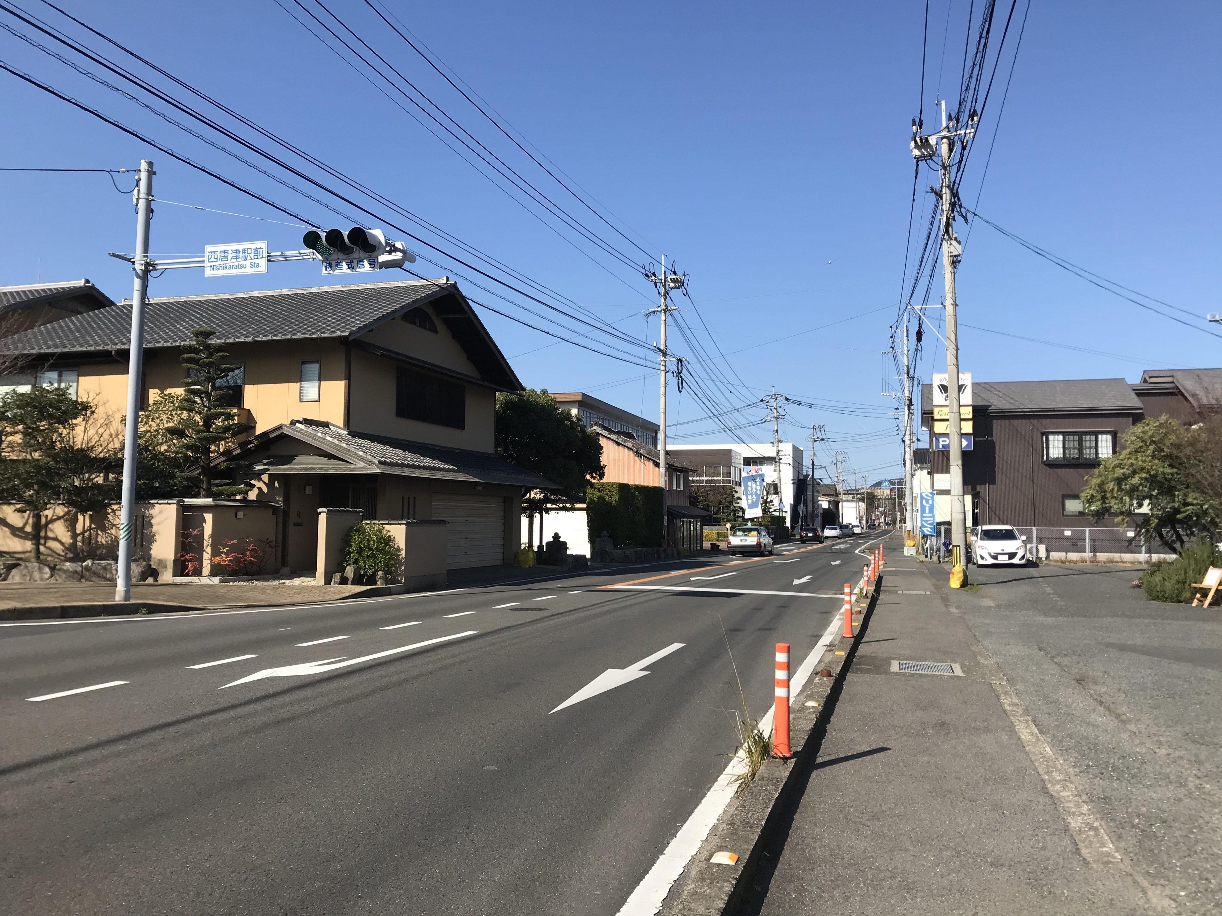 西唐津駅前の佐賀県道23号